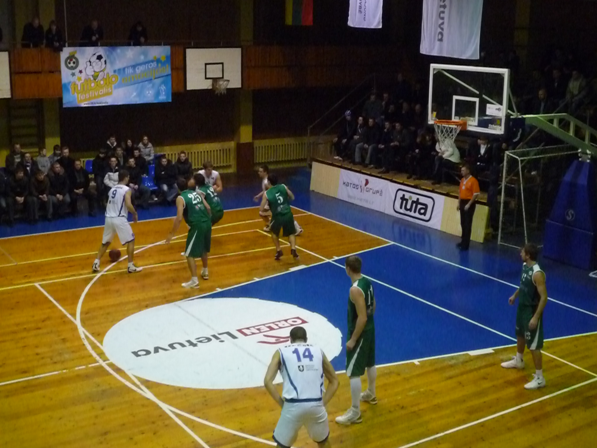 Mažeikių "Mažeikiai" - Prienų Rūdupis. LKF didžiosios taurės varžybos, 2009 gruodžio 27, Mažeikiai. Su kamuoliu Marijus Norkus.